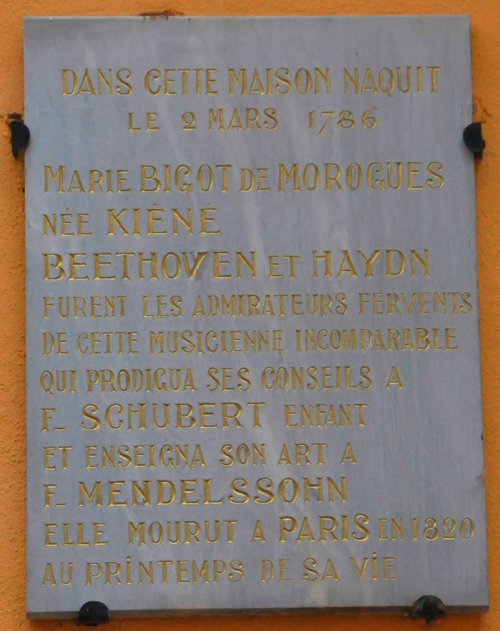 Infotafel am Geburtshaus von Marie Bigot